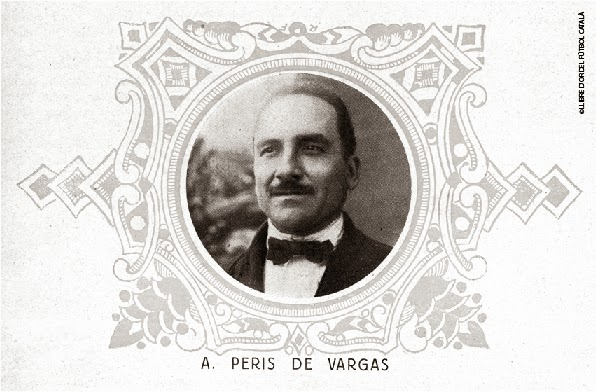 Foto: Agustí Peris de Vargas